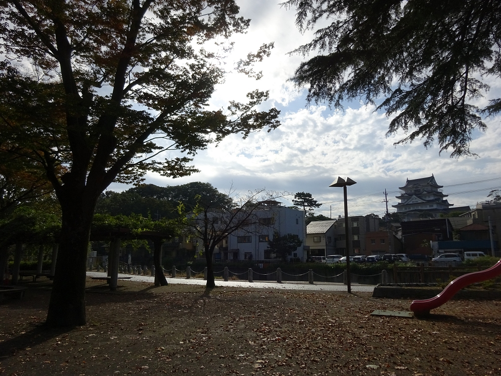 本町公園から亥鼻方面